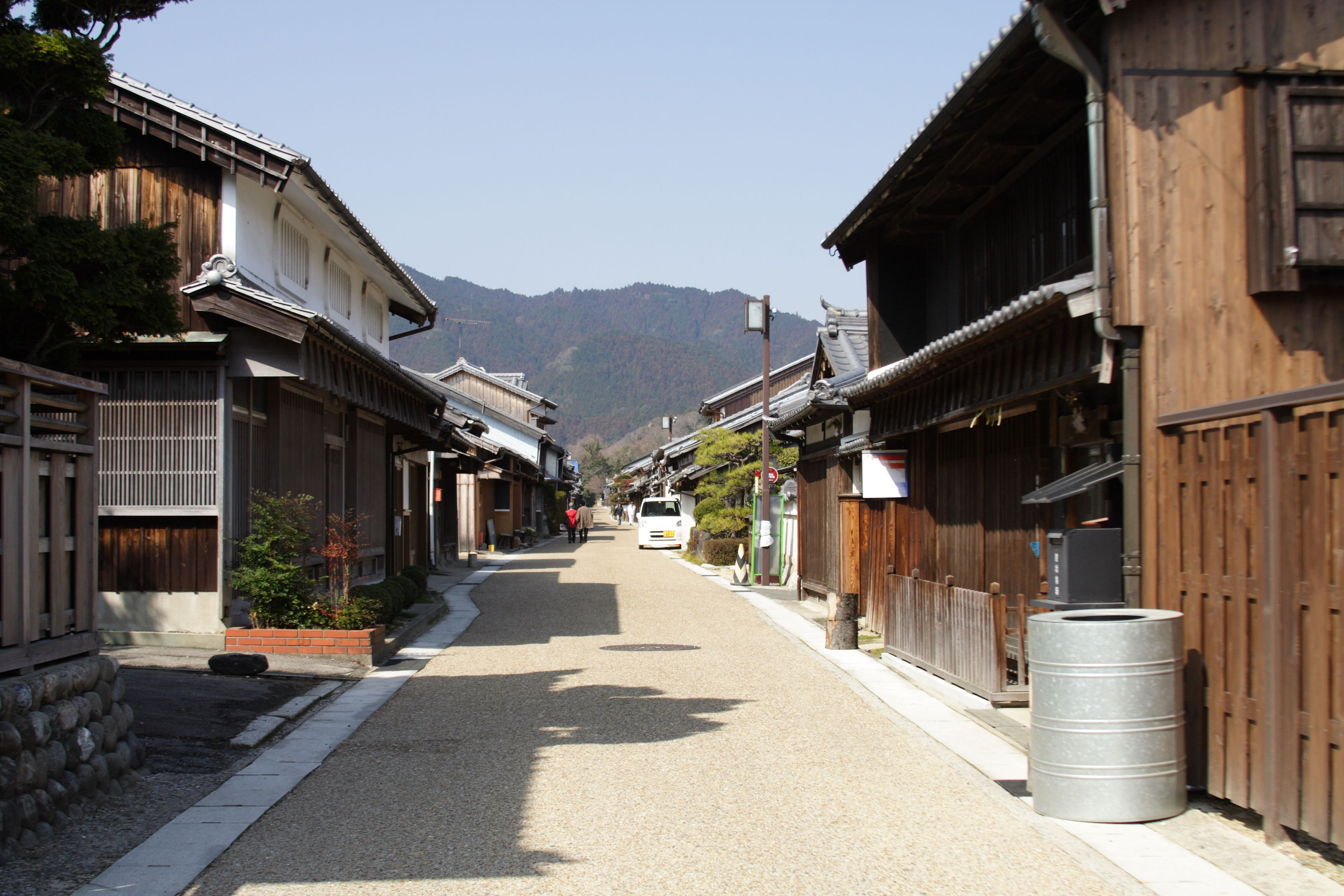 東海道五十三次・関宿(三重県・亀山市)/Sekijuku on Tokaido(Kameyama City, Mie, Japan)